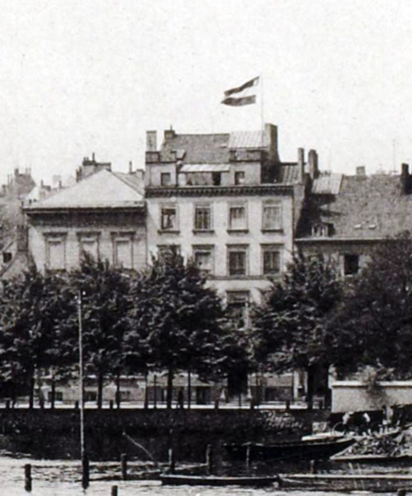 Neuer Jungfernstieg 20 (mit Flagge). Bildausschnitt aus “Neuer Jungfernsteieg 1892”. Inhalt einer Bildmappe “Hamburg” mit 32 Photodrucken.